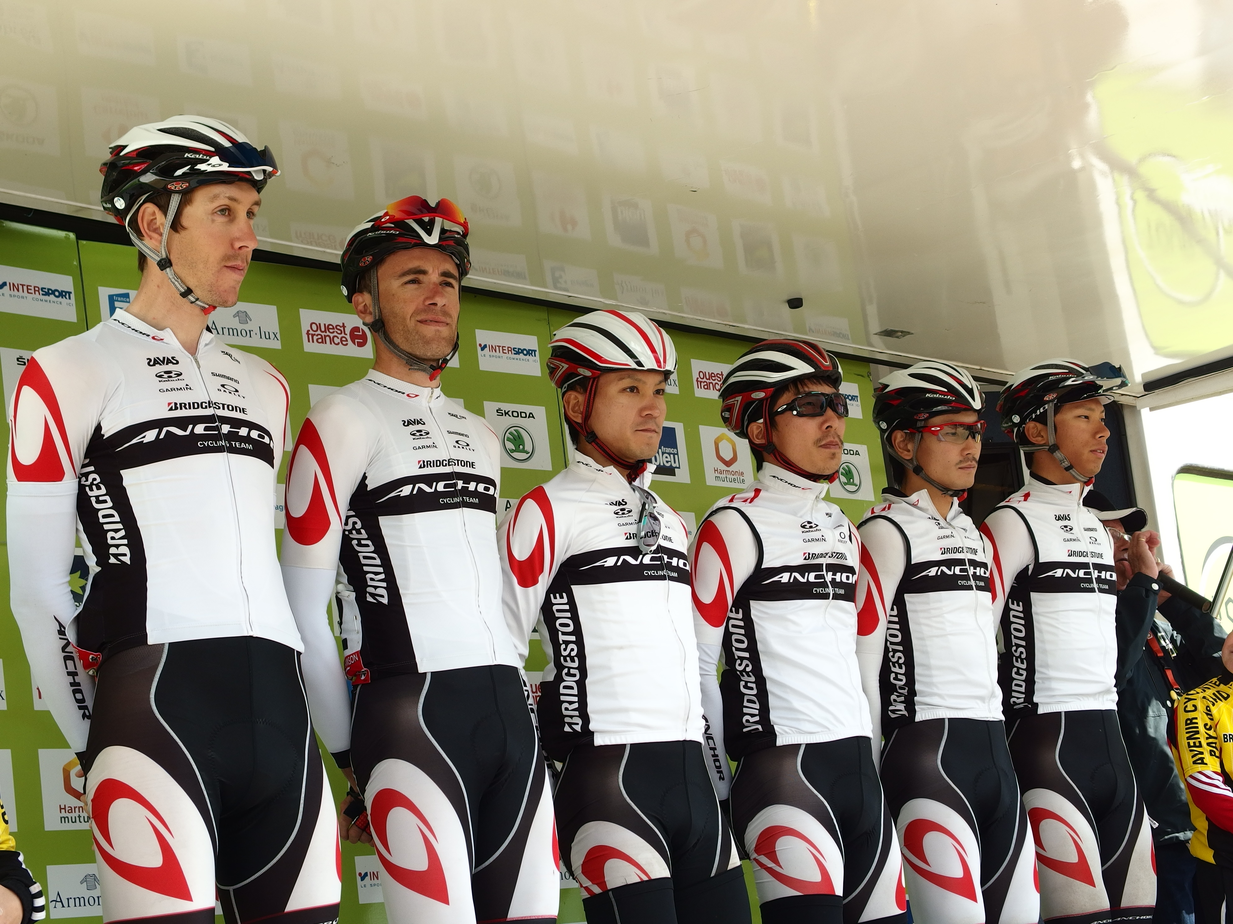 Tour de Bretagne 2015 - Présentation des équipes au départ de la troisième étape à Baud - Équipe Bridgestone Anchor Depicted people: Damien Monier, Thomas Lebas, Kōhei Uchima, Ryota Nishizono, Sho Hatsuyama and Takerō Terasaki